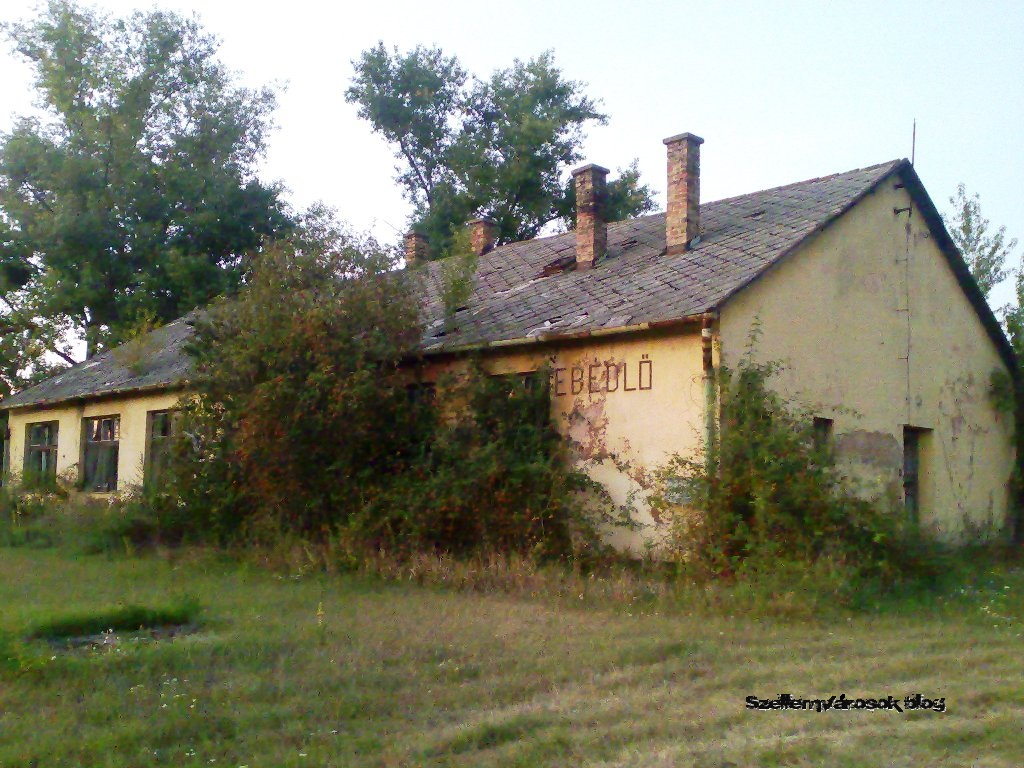 Elhagyott étterem